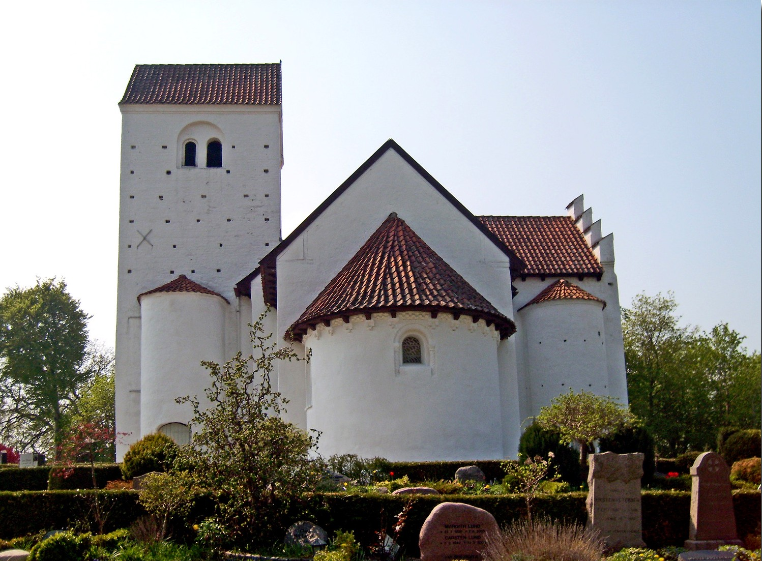 fra øst